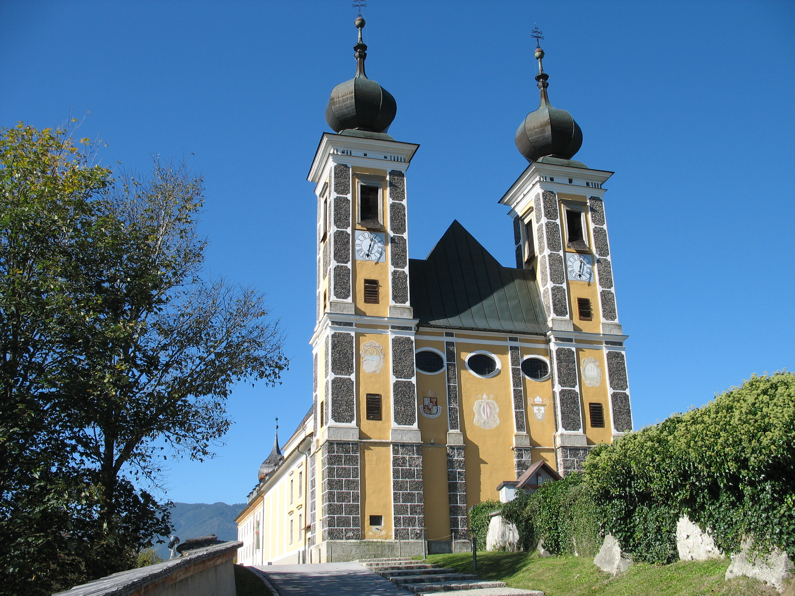 Wallfahrtskirche Frauenberg, Steiermark